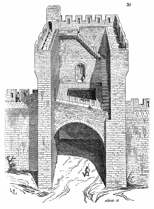 ... Les tours d'Aigues-Mortes, bâties par Philippe le Hardi, sont sur plan quadrangulaire; même plan adopté pour la plus grande partie des tours de l'enceinte d'Avignon. Il faut dire que tout un front de ces remparts fut ordonné sous le pape Innocent VI, par Jean Fernandez Heredia, commandeur de Malte, et que les dispositions adoptées alors furent suivies successivement, c'est-à-dire de 1350 à 1364. La plupart de ces tours sont très-saillantes sur la courtine, dont le chemin de ronde passe derrière elles ou qui se trouve interrompu par les flancs. De plus, ces tours sont généralement ouvertes à la gorge. La vue perspective (fig. 30), prise du côté de la ville, explique complétement le système de défense, et indique les moyens d'accès aux deux étages. Ouverte à la gorge, elle ne peut être considérée comme un réduit indépendant, au besoin; cependant les chemins de ronde des courtines sont interrompus à la façon des tours romaines dont parle Vitruve. Sa surface étendue permettait de réunir à son sommet un assez grand nombre de défenseurs ...